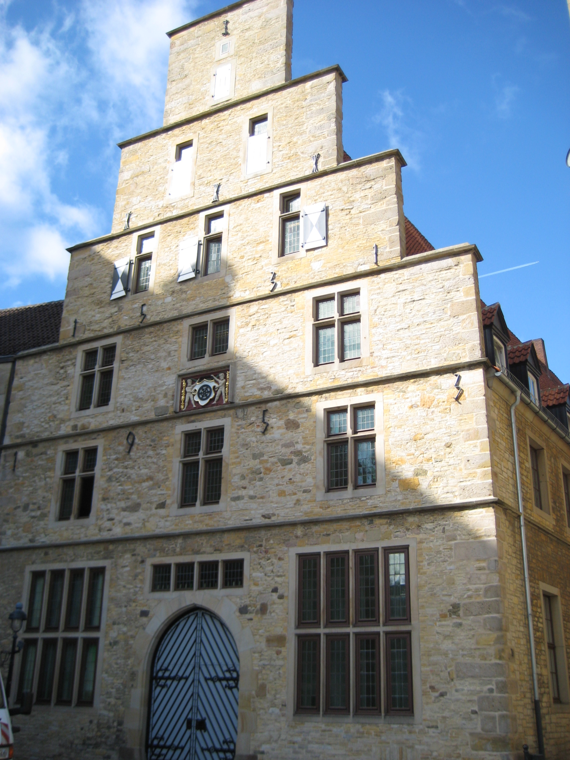 Die unter Denkmalschutz stehende Stadtwaage in Osnabrück, 1532 noch spätgotisch erbaut, im Zweiten Weltkrieg ausgebrannt, 1953 äußerlich rekonstruiert